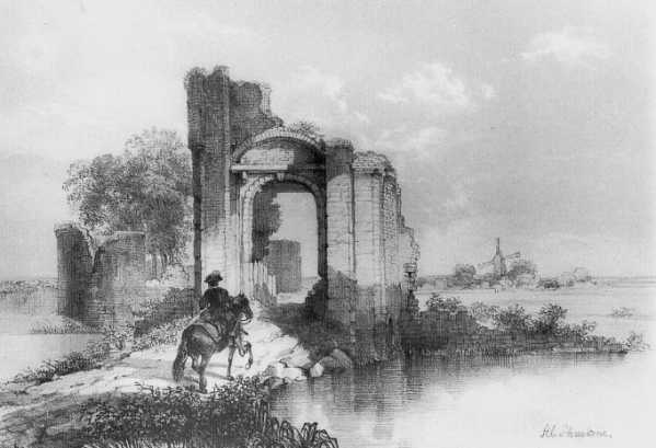 Ruine toegangspoort kasteel 'De Nijenborgh'